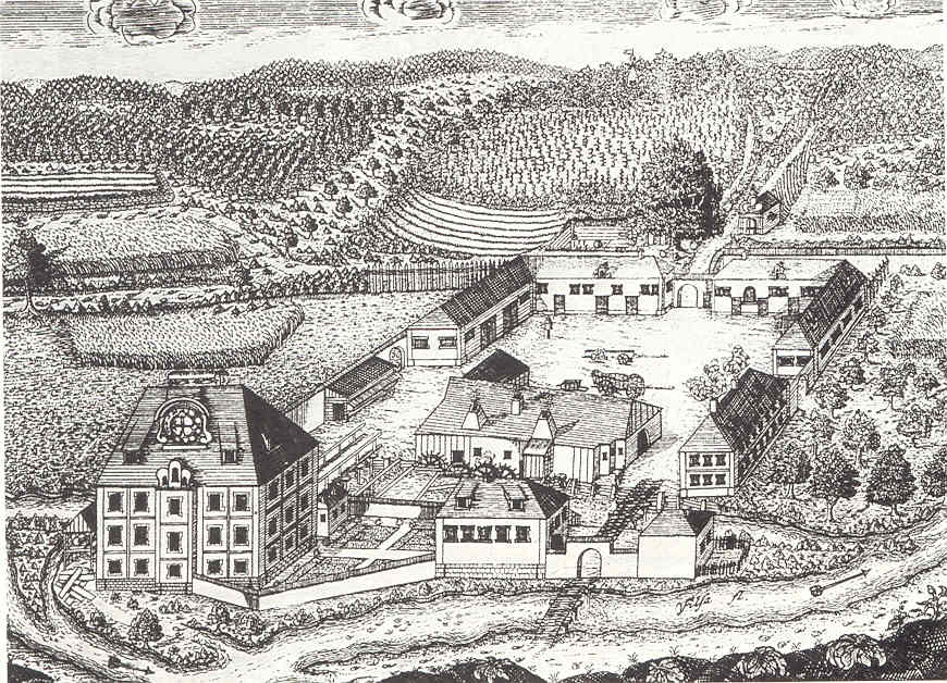 Das ehemalige Hammerwerk in Leidersdorf, Gemeinde Ensdorf in der Oberpfalz